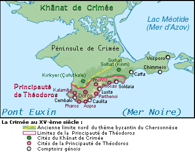 La Crimée au XV-e siècle, avec la Principauté grecque de Théodoros